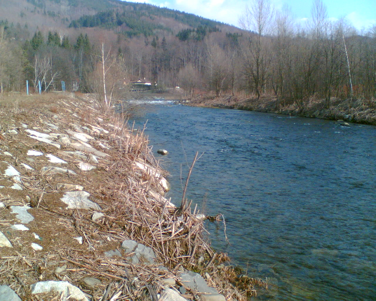 Morávka pod Raškovicemi